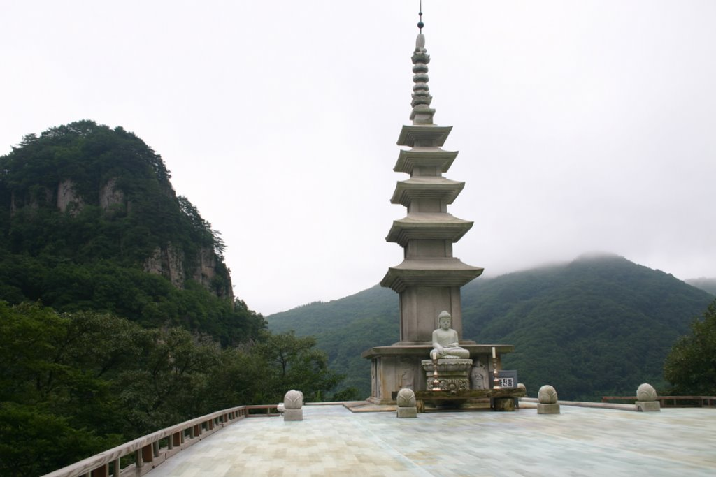 Cheongnyangsa Temple, Bonghwa County, Gyeongsangbuk-do, South Korea.